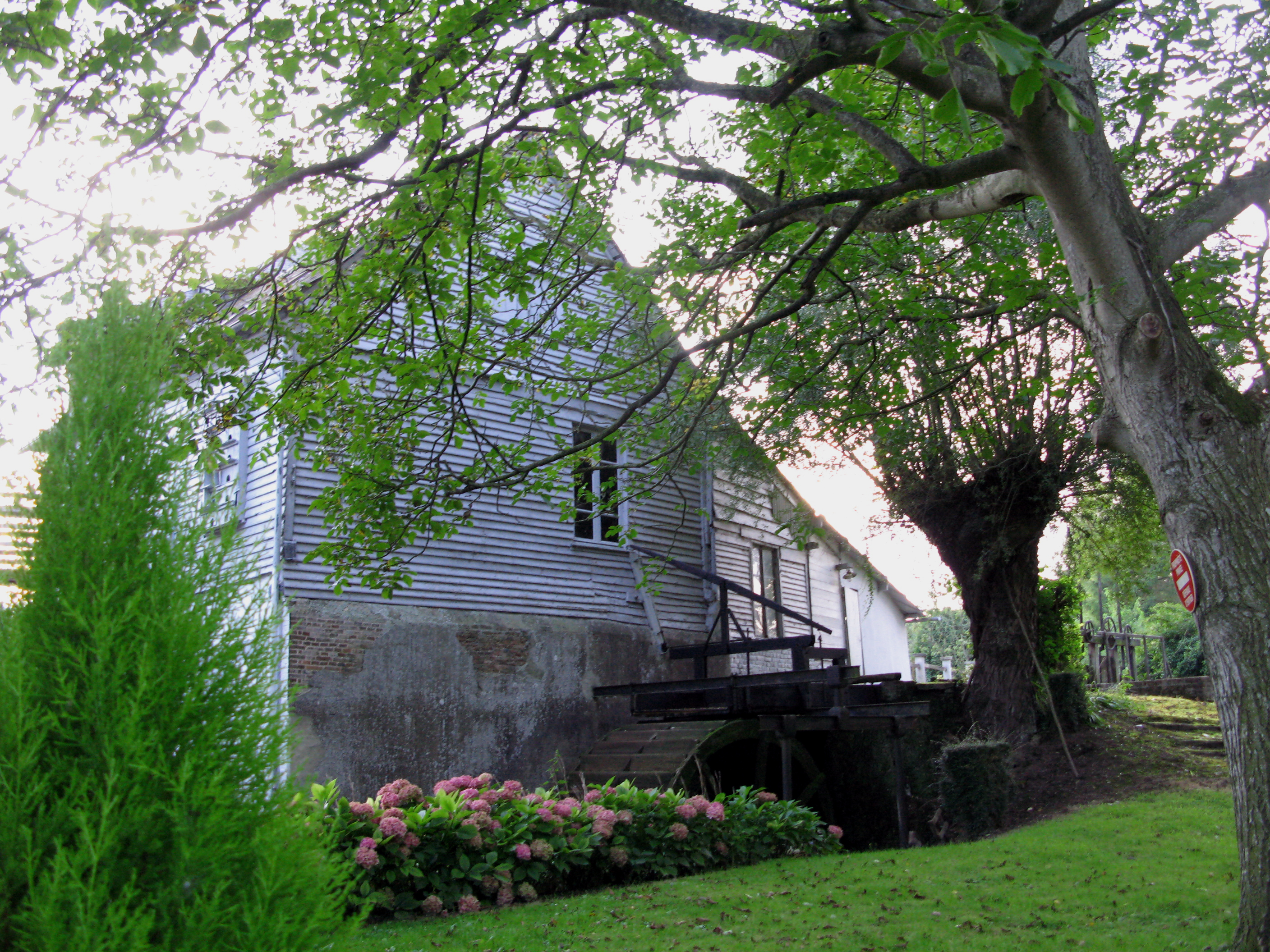 Maisnières (Somme, France) - Le moulin de Visse. .